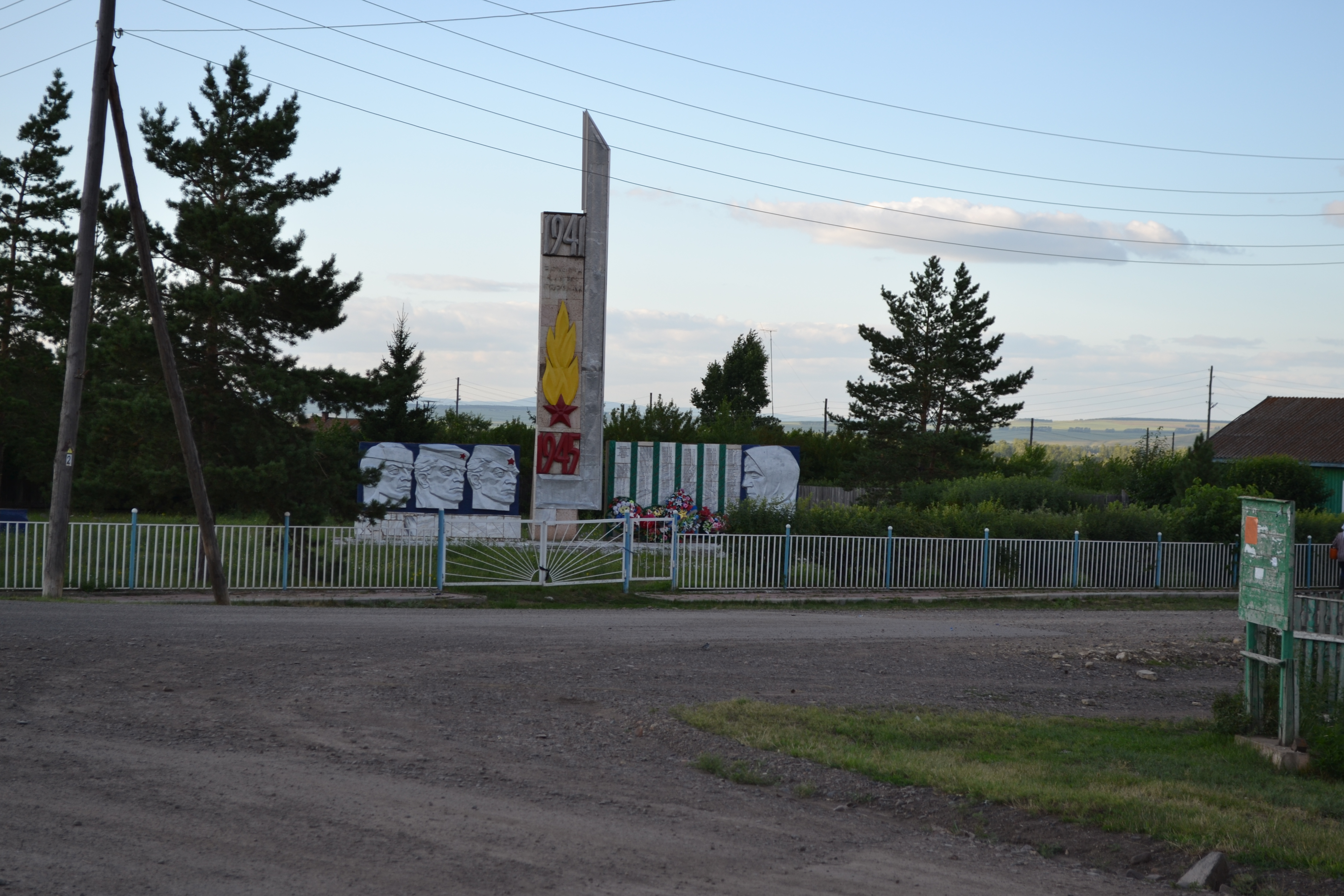 Памятник расположен рядом с сельсоветом